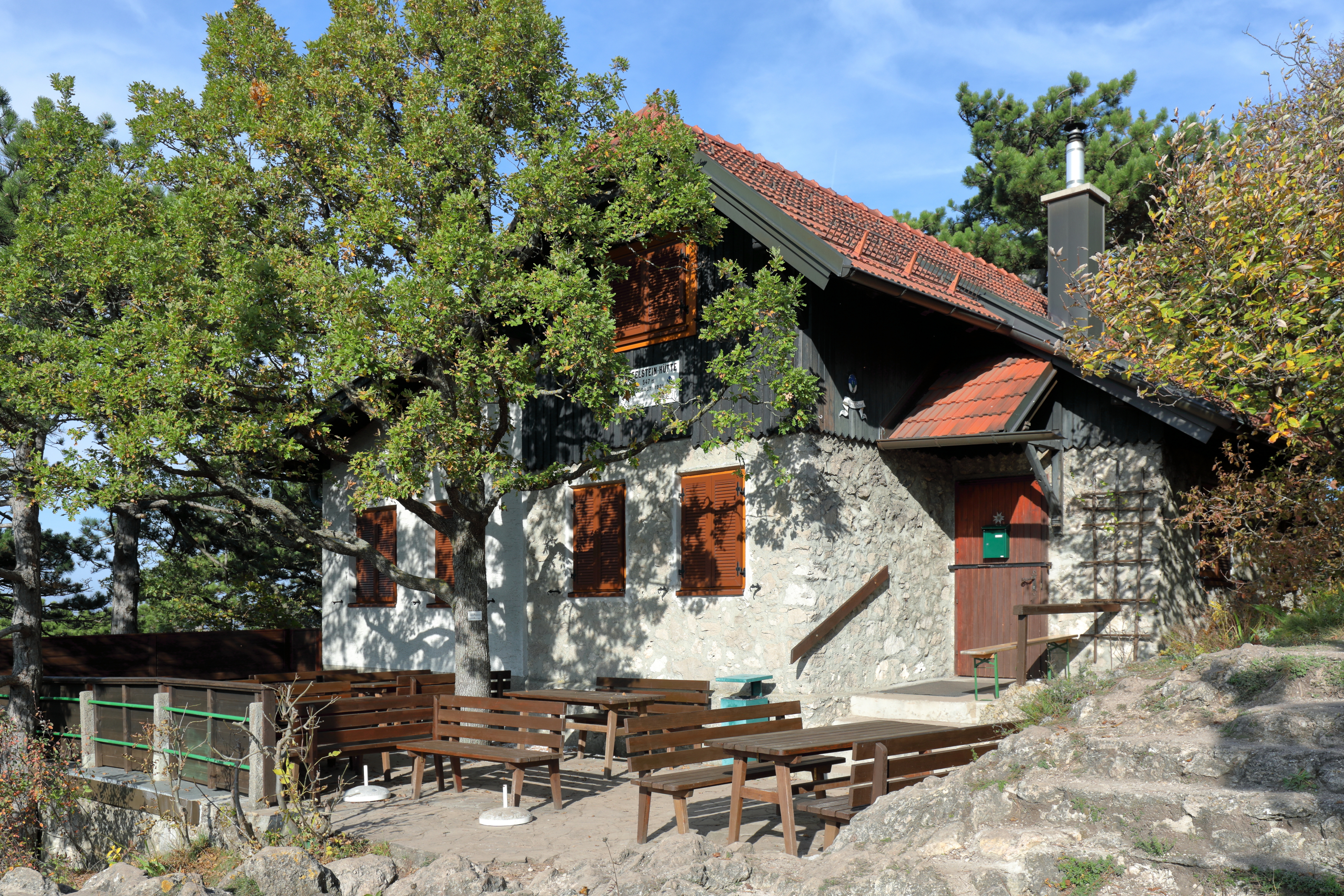 Südansicht der Teufelsteinhütte am Gipfel des Teufelsteins in der niederösterreichischen Marktgemeinde Perchtoldsdorf. Die zwischen Kaltenleutgeben und Perchtoldsdorf und auf 542 m (lt. BEV) gelegene Schutzhütte wurde ab 1931 vom Österreichischen Gebirgsverein errichtet, am 12. Juni 1932 eröffnet und 1973 erweitert.